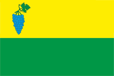 Прапор села Зарожани